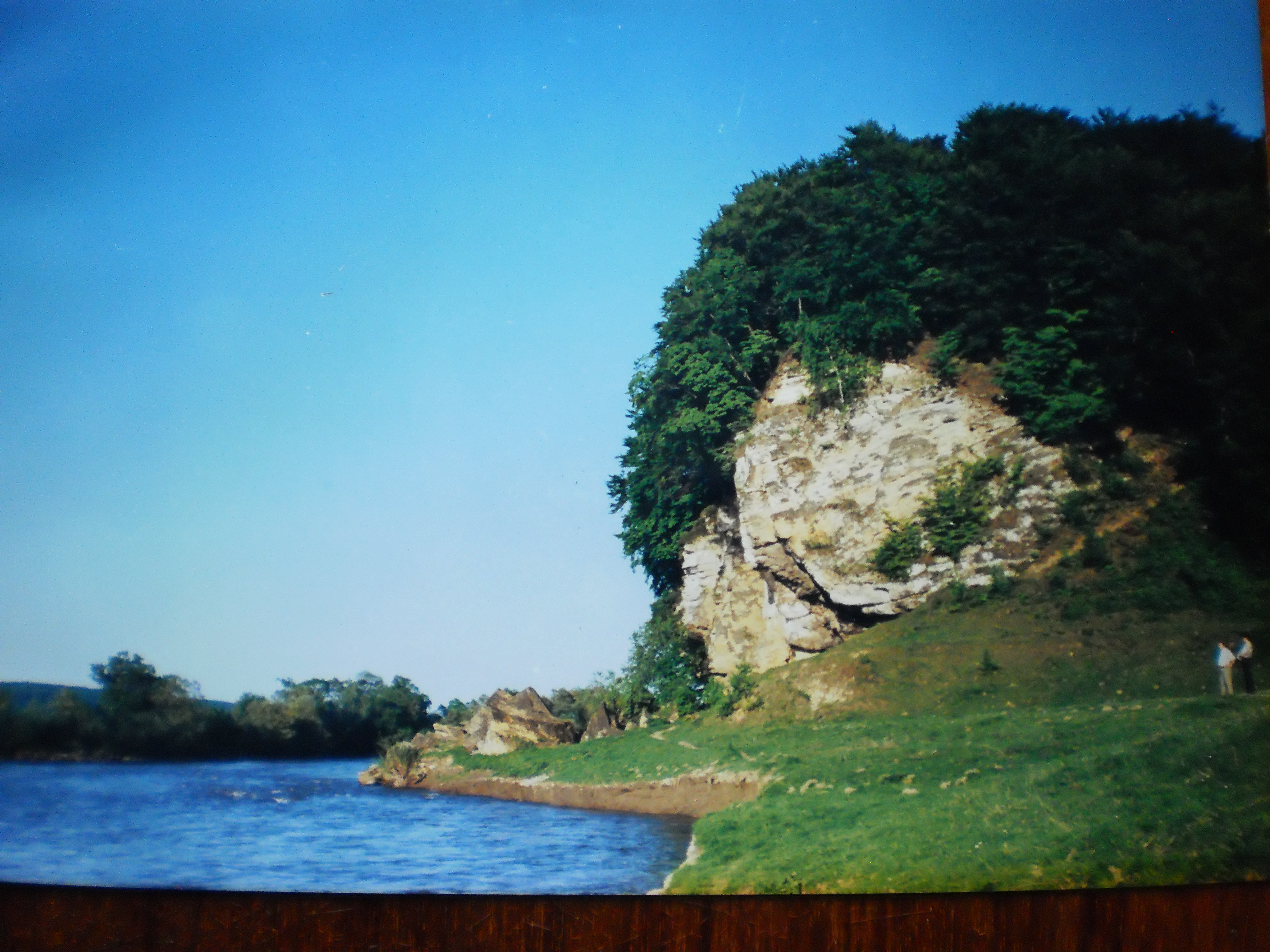 Фото № 17. р. Дністер. Царинка 2001р